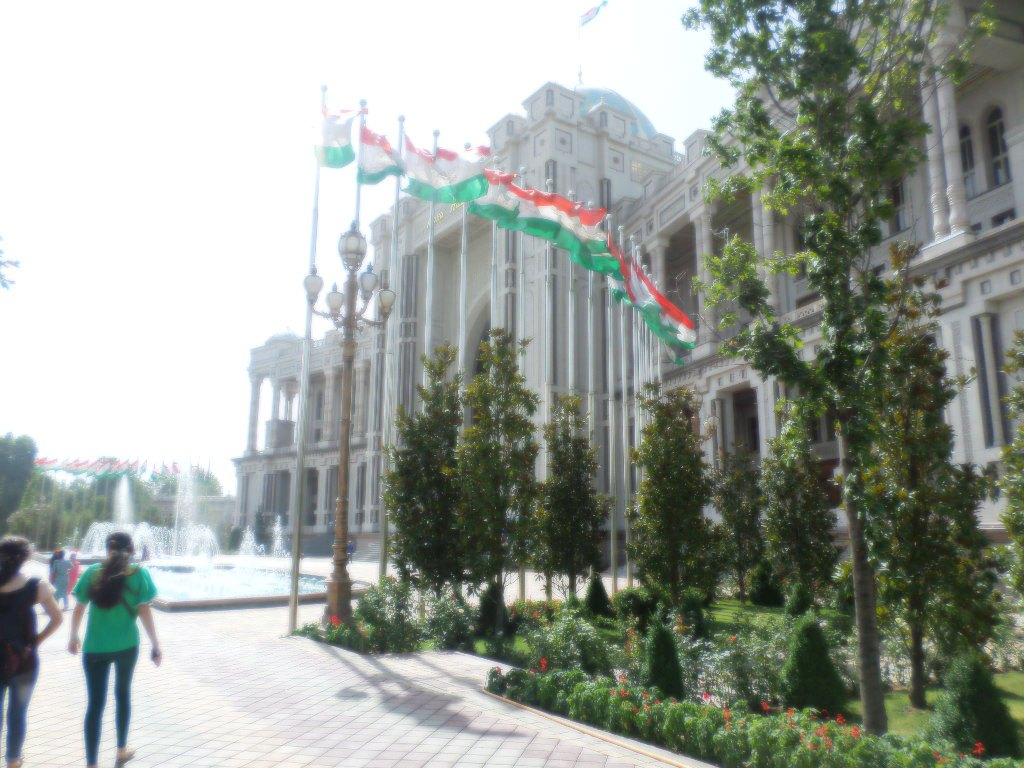 Архитектура 2010-х гг. в г. Душанбе, чайхана "Наврузгох"